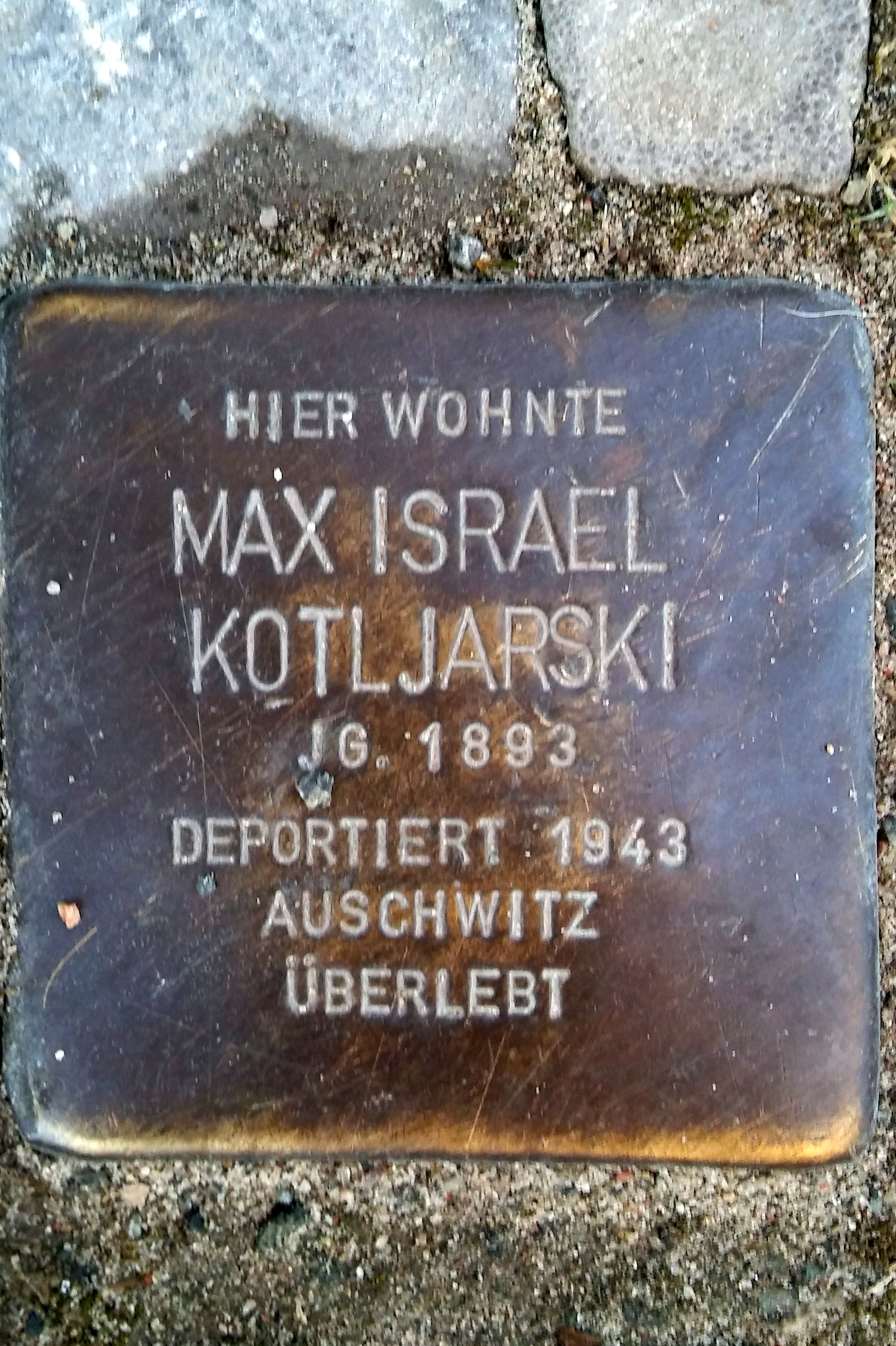 Stralsund, Mühlenstraße 24, Stolperstein Max Israel Kotljarski